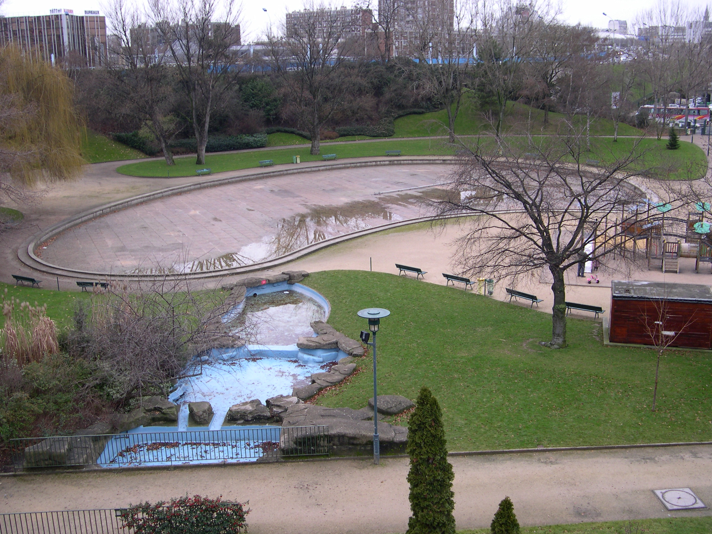 La petite rivière artificielle et le petit plan d'eau asséchés du parc Kellerman certainement pour cause de vidange pendant l'hiver.